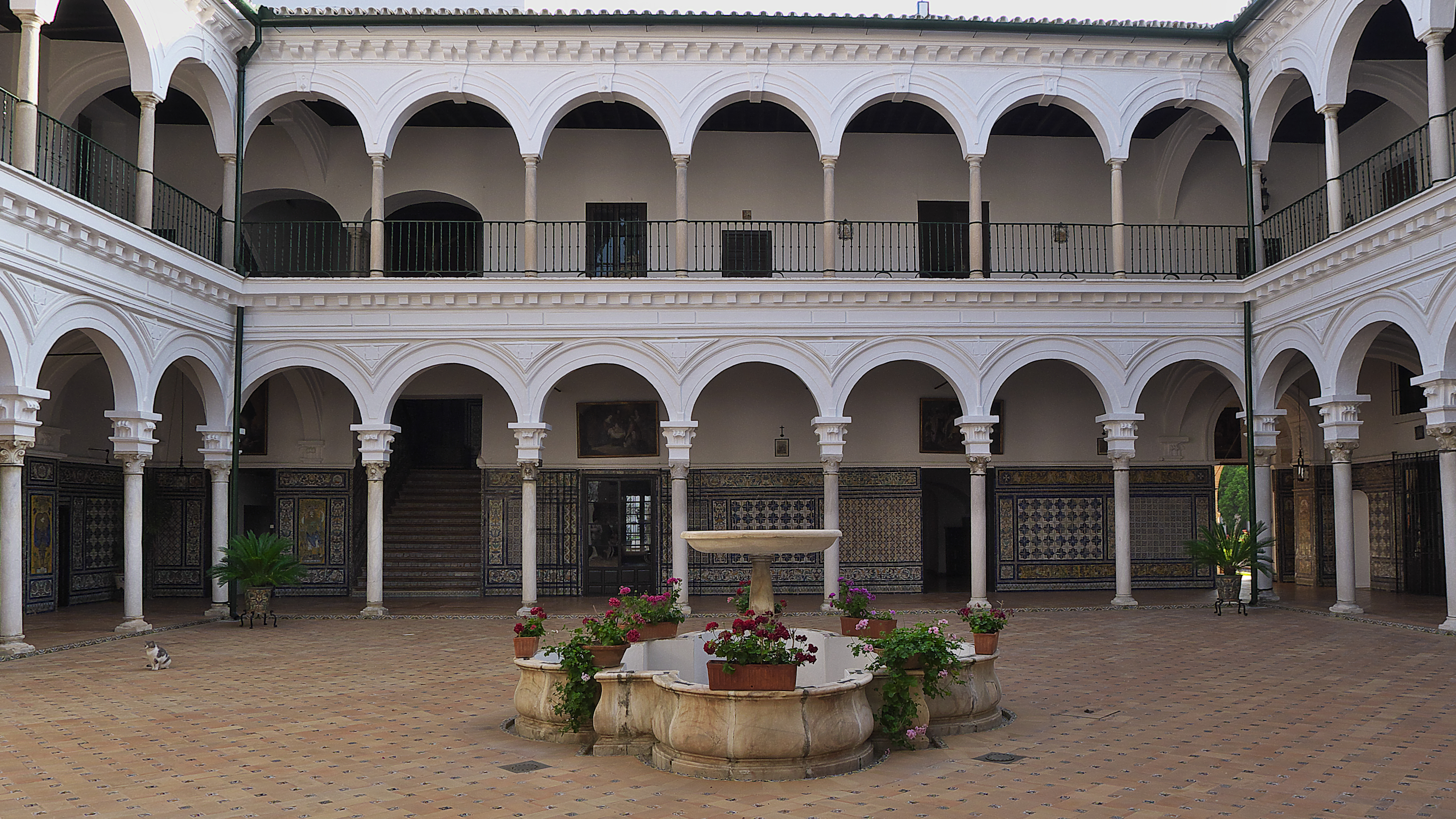 Claustro principal del monasterio. Diego López Bueno, primer cuarto del XVII.